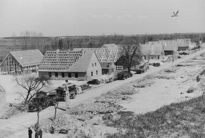 Wartheland, Neubauten für Umsiedler Neues Dorf im Wartheland. Die zwei Häuser in der Mitte sind der Rest des von den Polen im September 1939 völlig niedergebrannten alten Dorfes. In wenigen Jahren bereits werden im ganzen Wartheland solche neue Dörfer entstanden sein, aus denen ein neues ostdeutsches Bauerntum leben und schaffen wird.